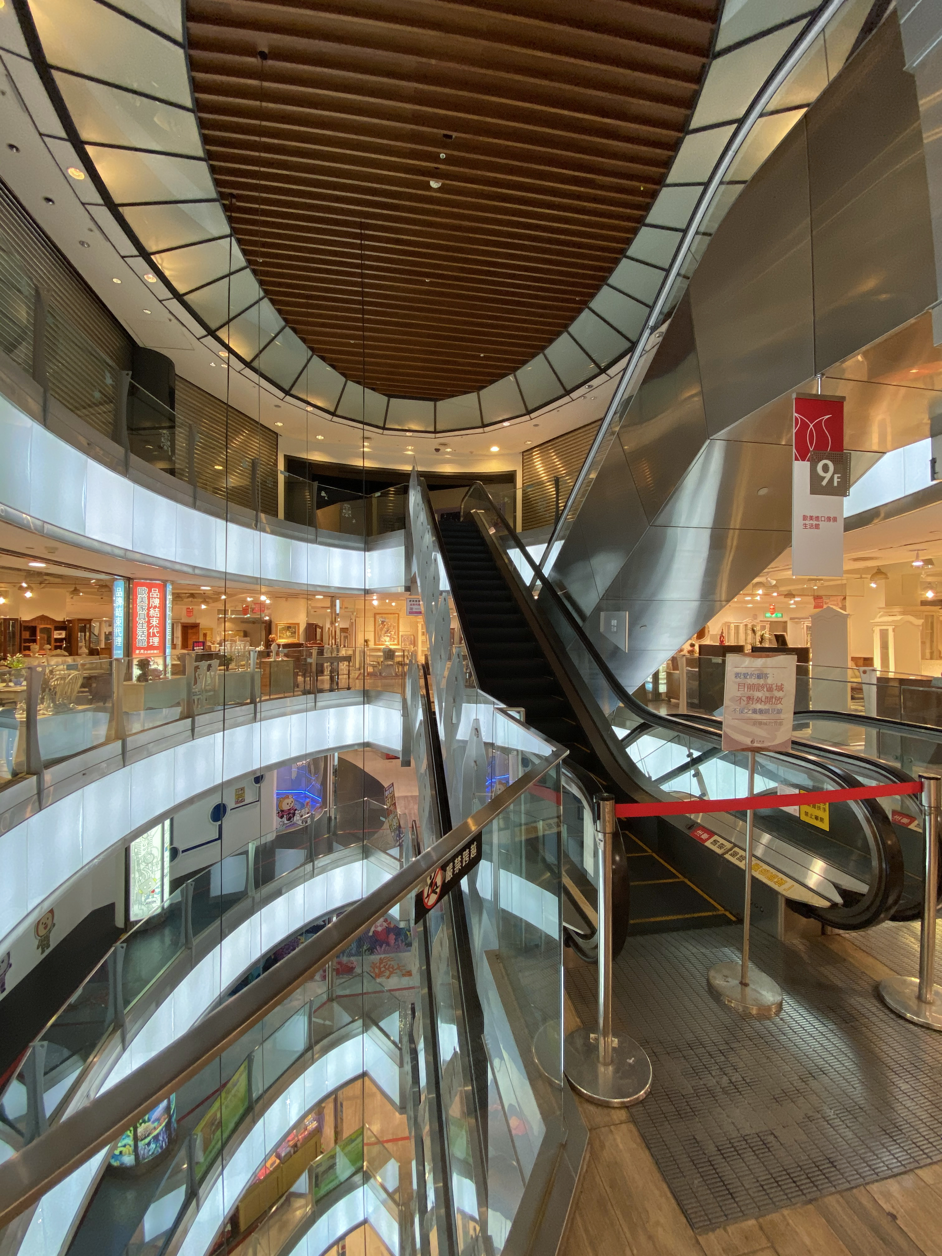 Living Mall escalator Void